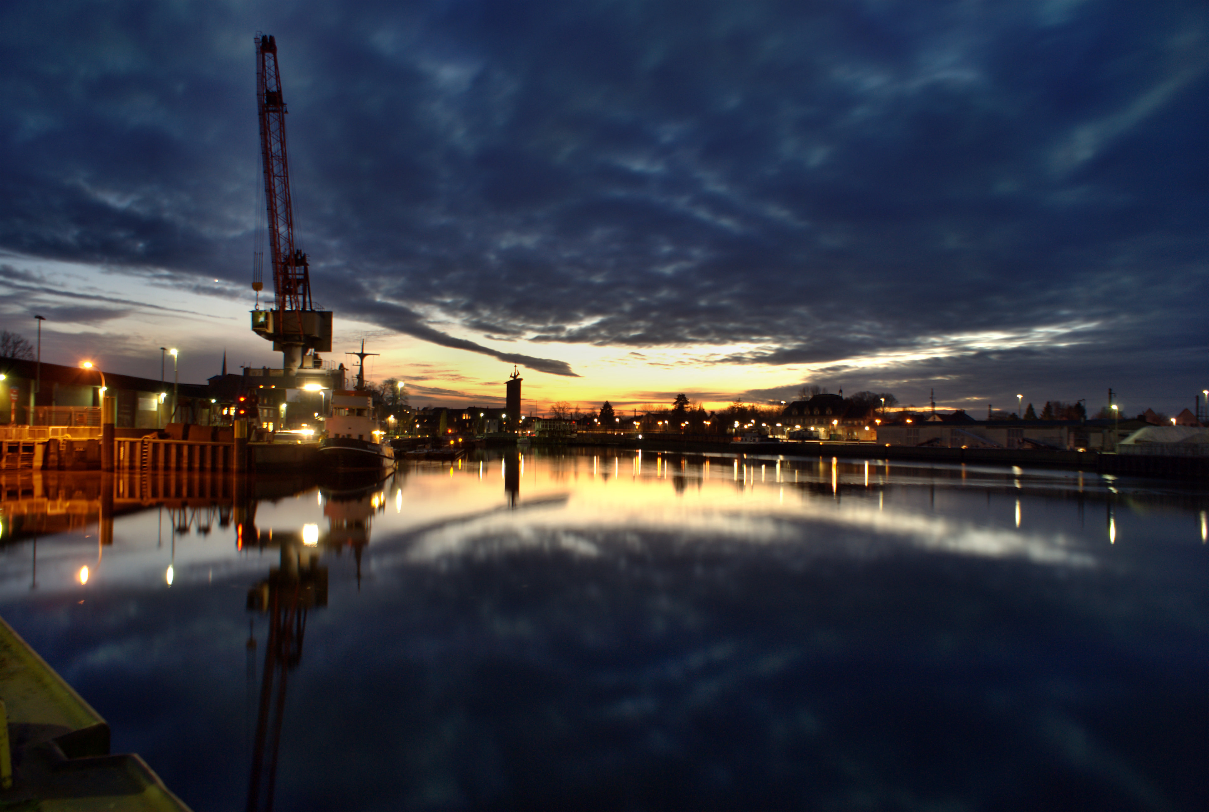 Blick vom Binnenhafen in Brake